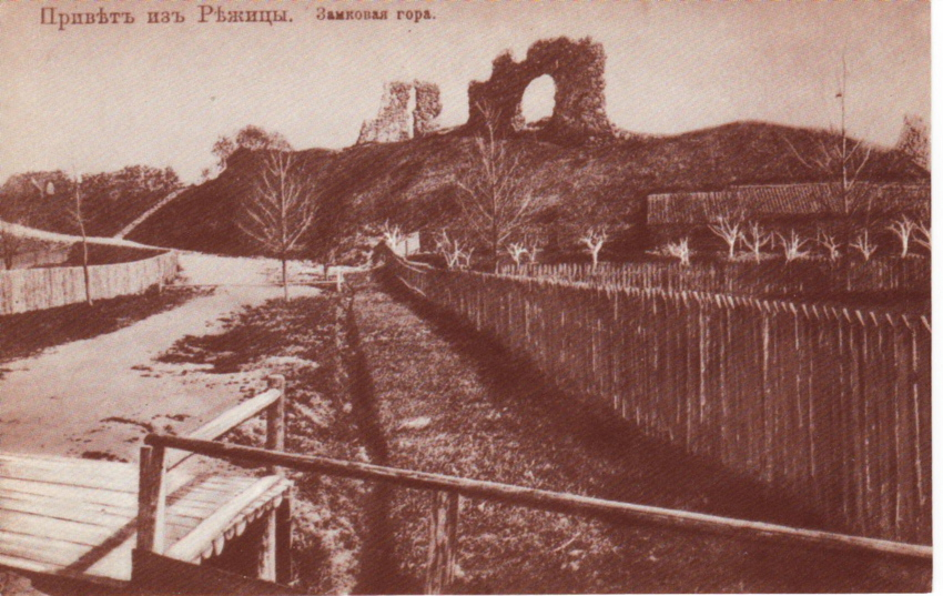 Rēzeknes pilsētas pilskalns 1904. gadā